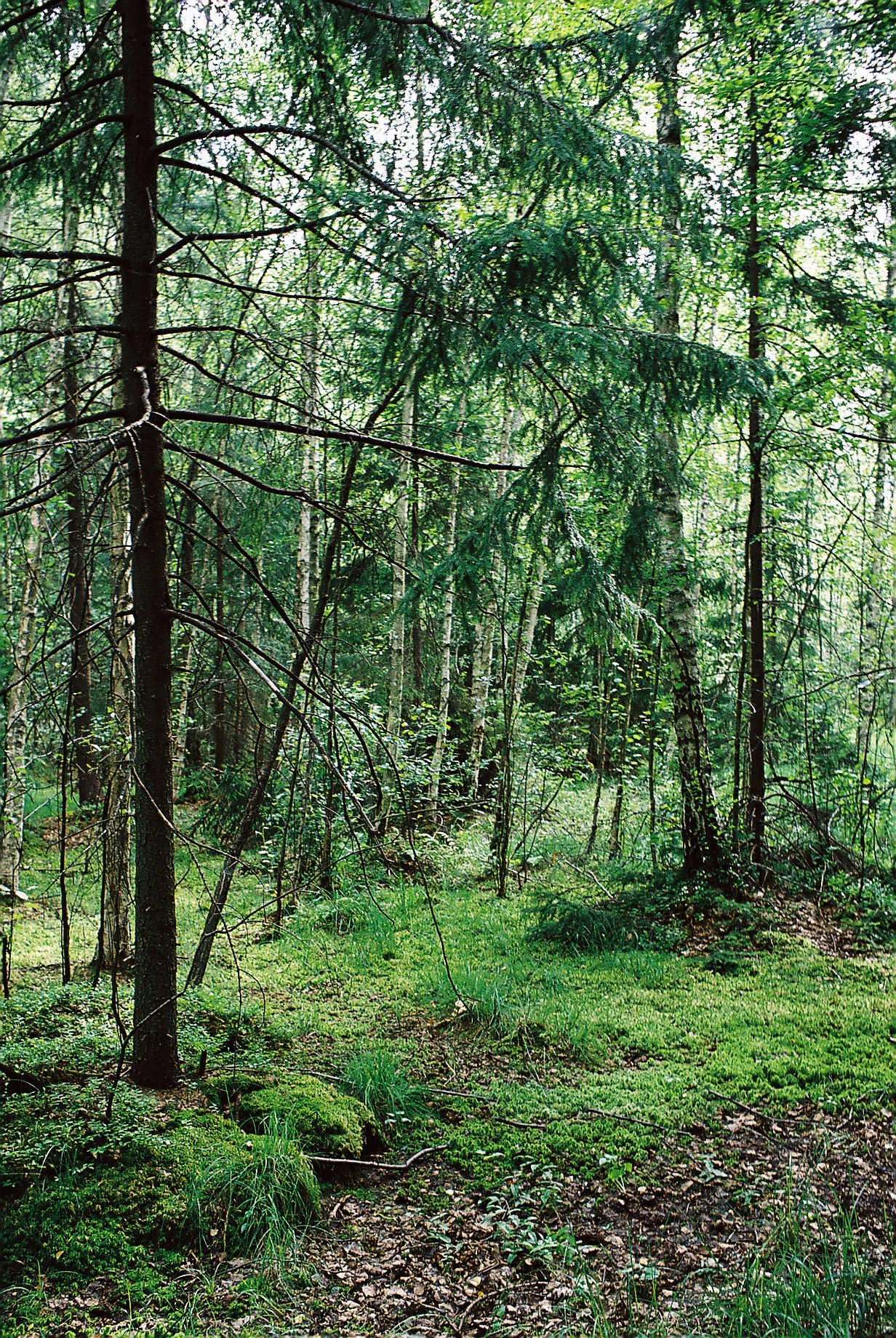 Autor: Adrian Grzegorz Rok wykonania: 2005